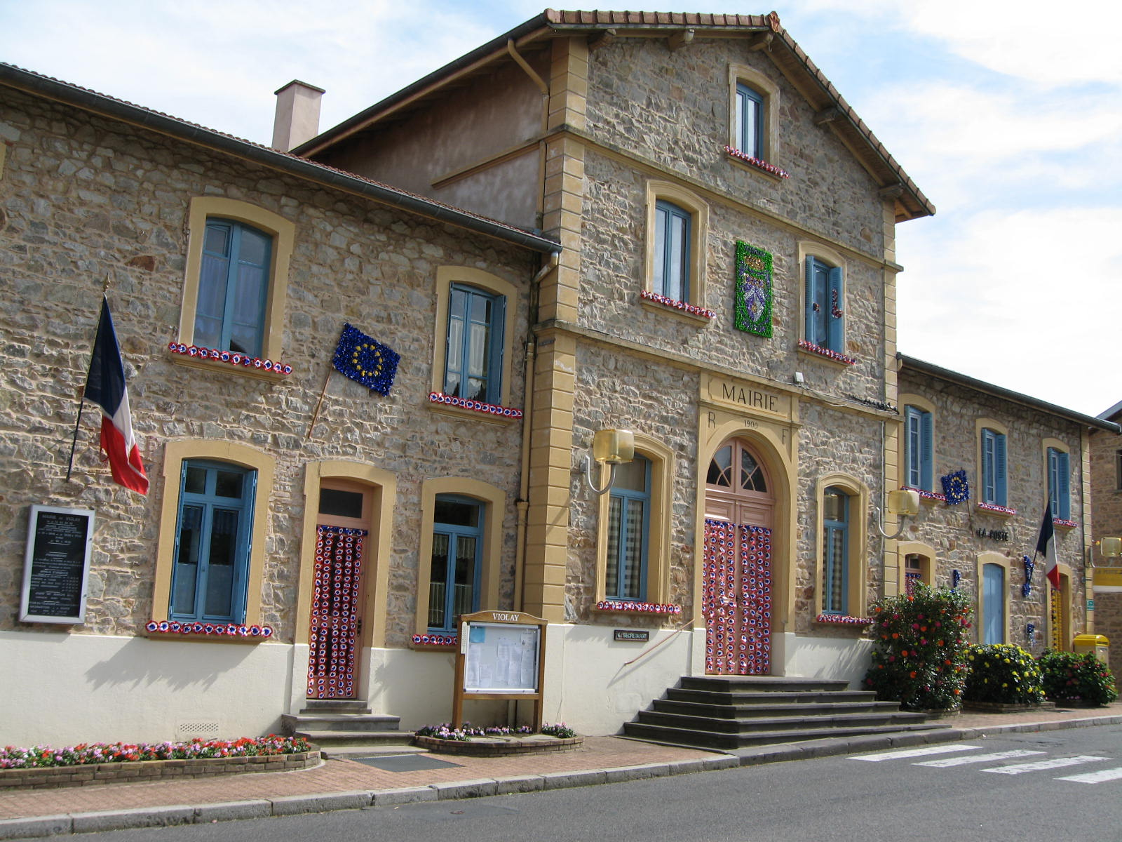 La mairie de Violay et la Poste décorée durant de festival musical des 3 vallées en juin 2007